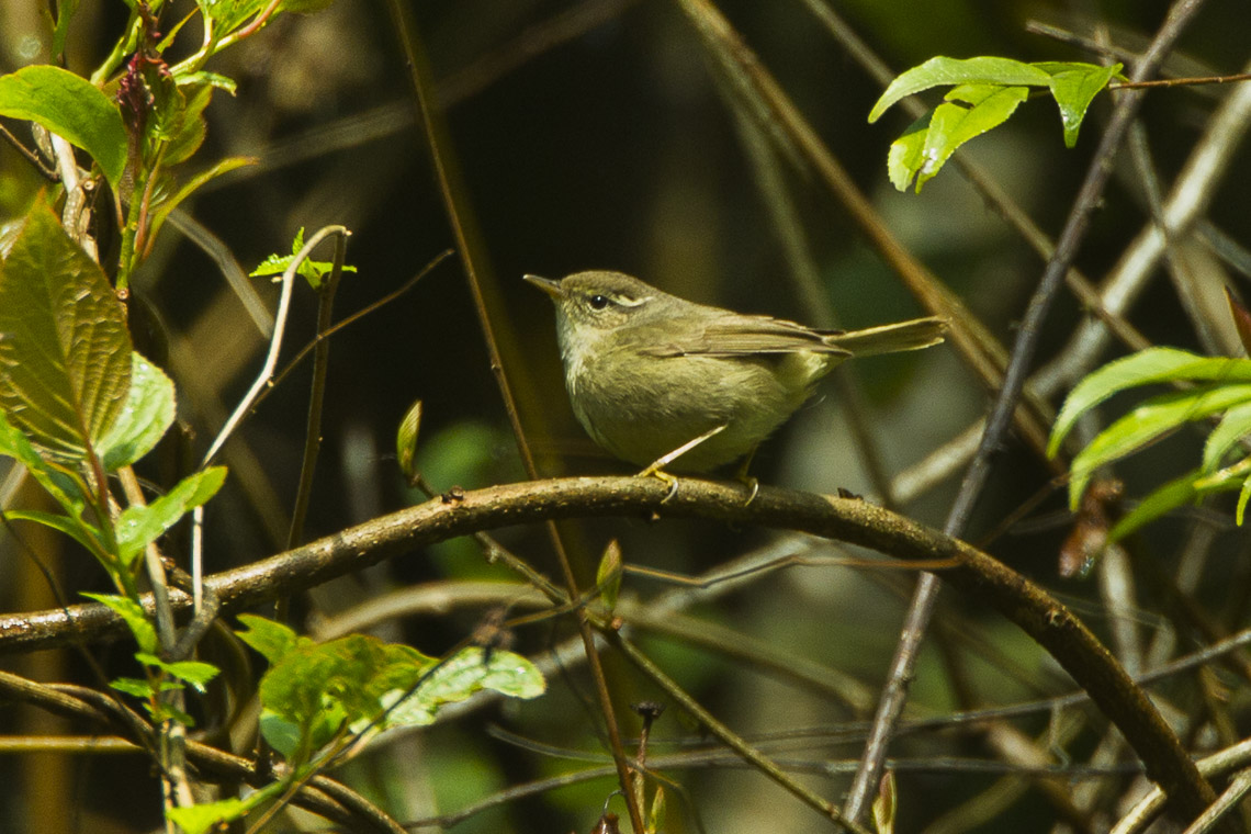 Dusky Warbler - Bhutan_S4E8995